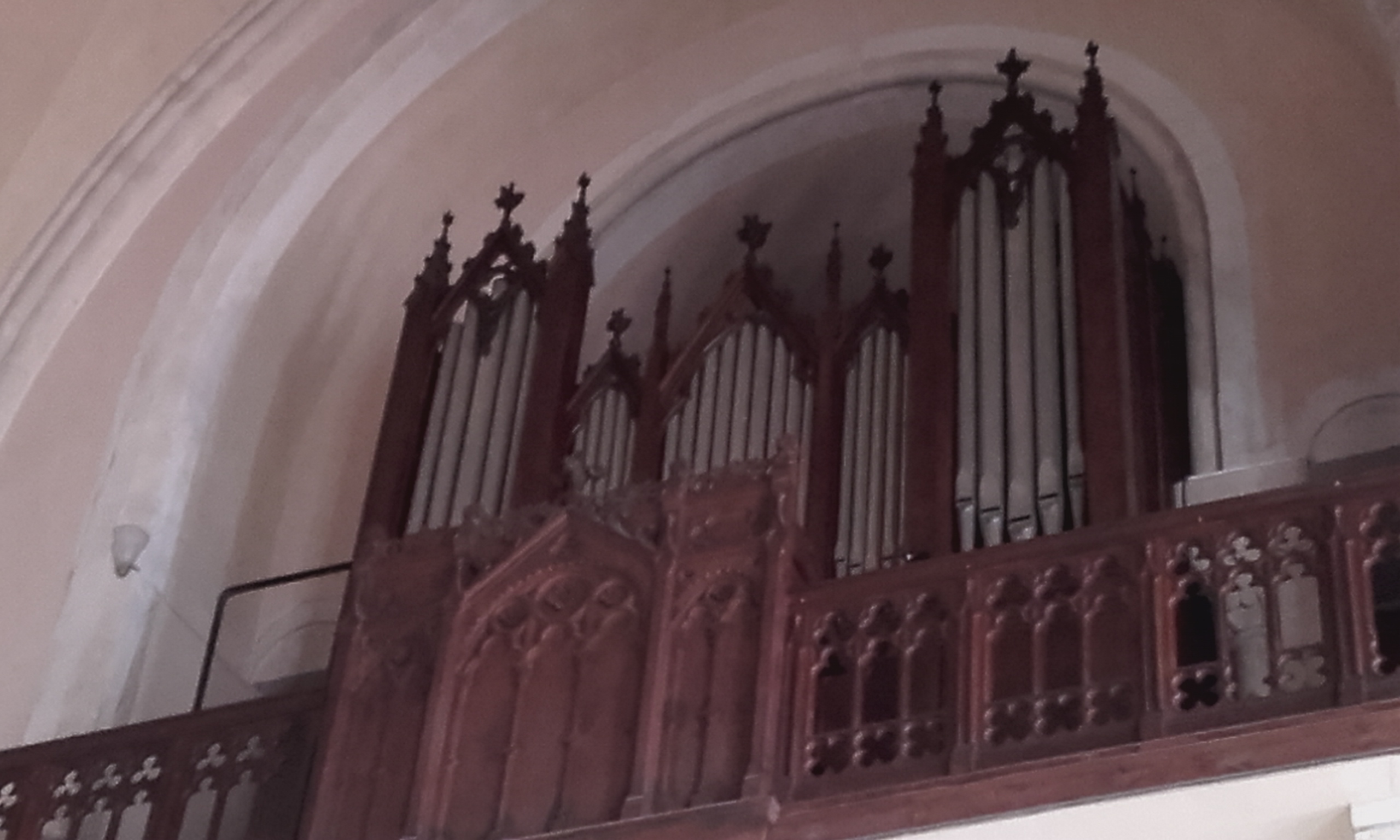 Vosges, Saulxures-sur-Moselotte. Orgue construit par le facteur d'orgues Jean-Pierre de Rambervillers, et inauguré le 7 mars 1869